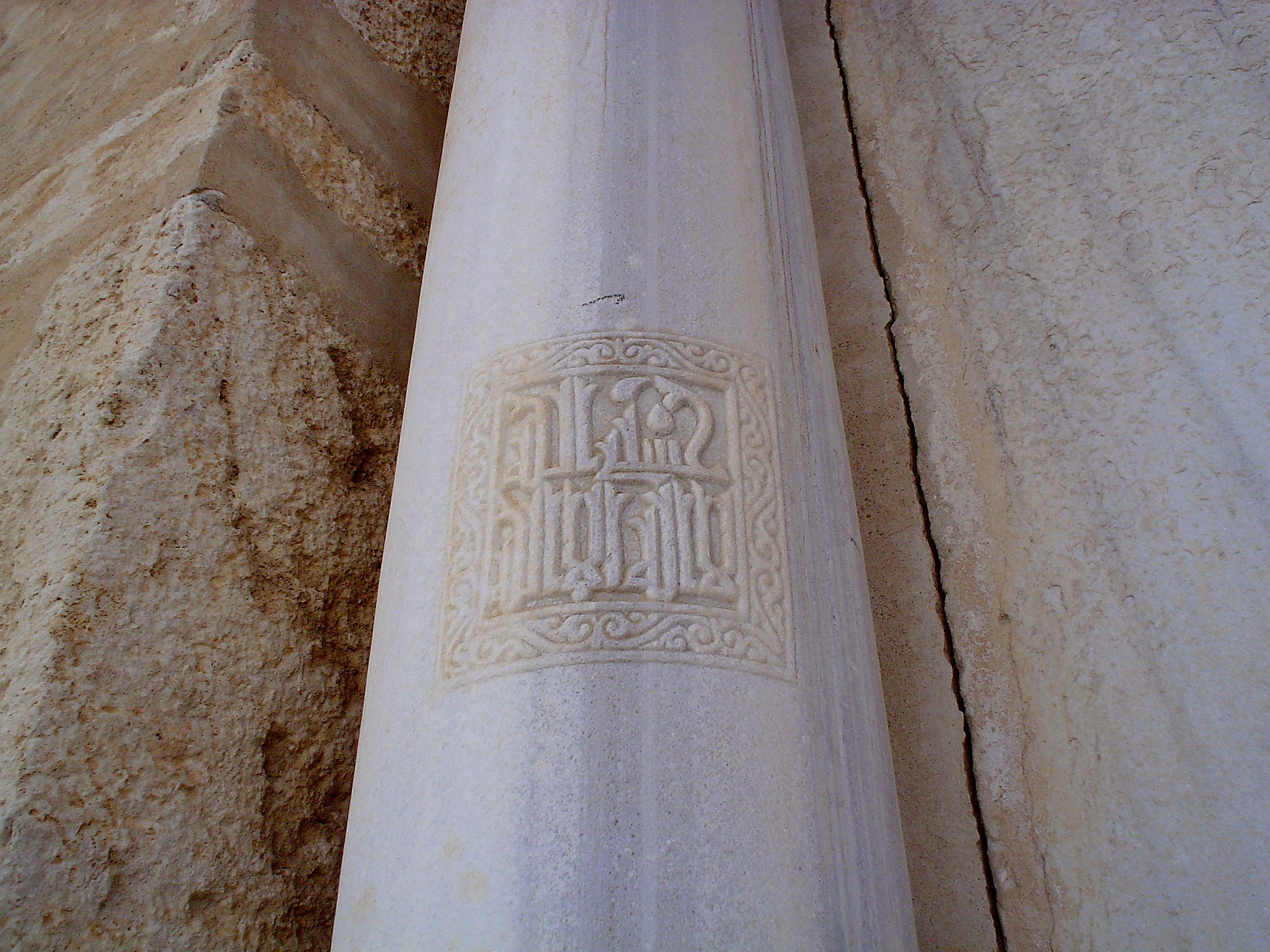 Inscription gravée sur une colonne de la façade orientale de la Grande Mosquée de Kairouan, Tunisie.